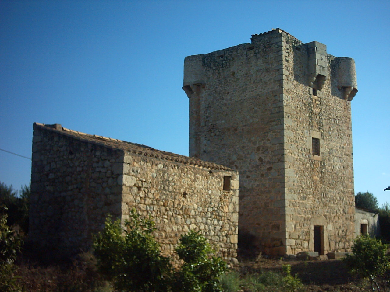 Torre Carmelet (Cabanes)